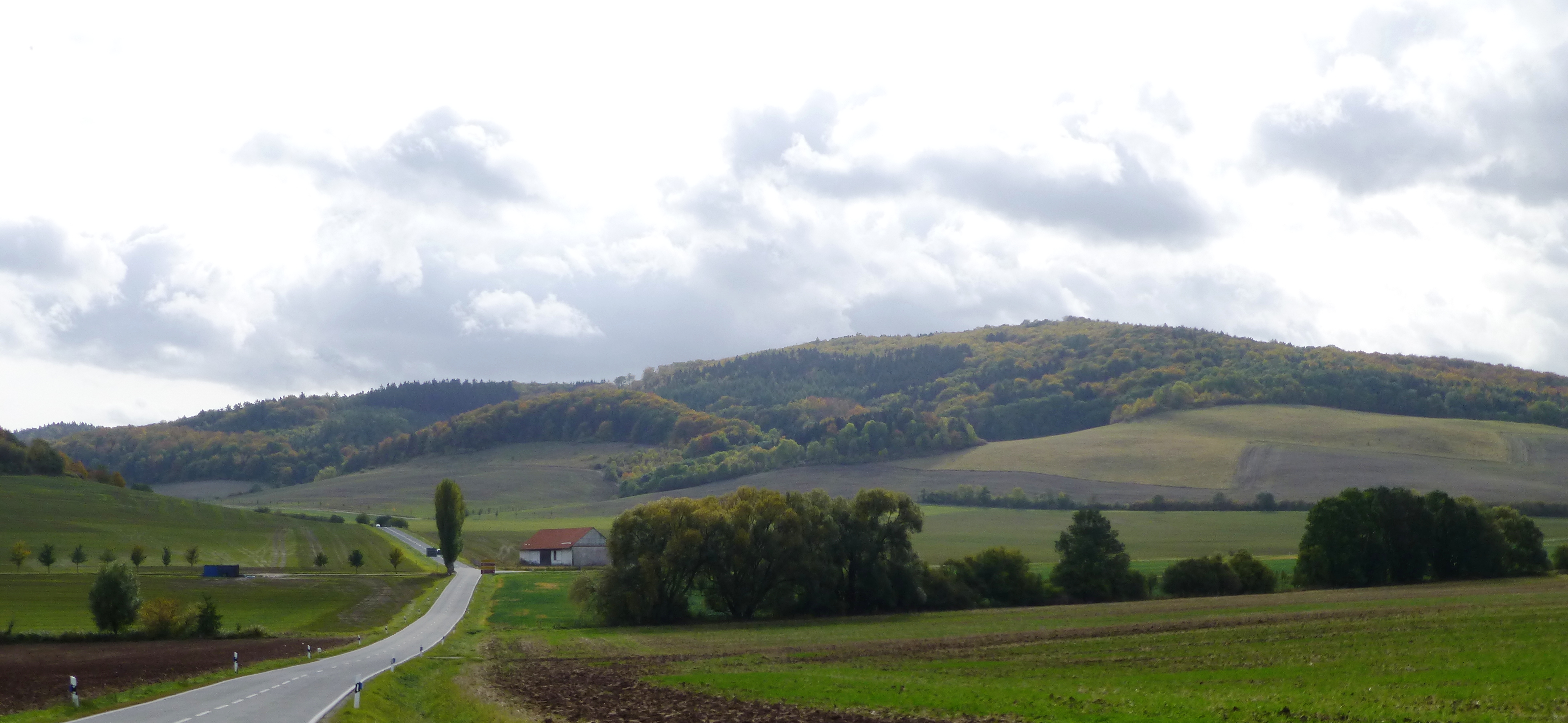 Blick von Norden auf die Junkerkuppe bei Bornhagen, Eichsfeld